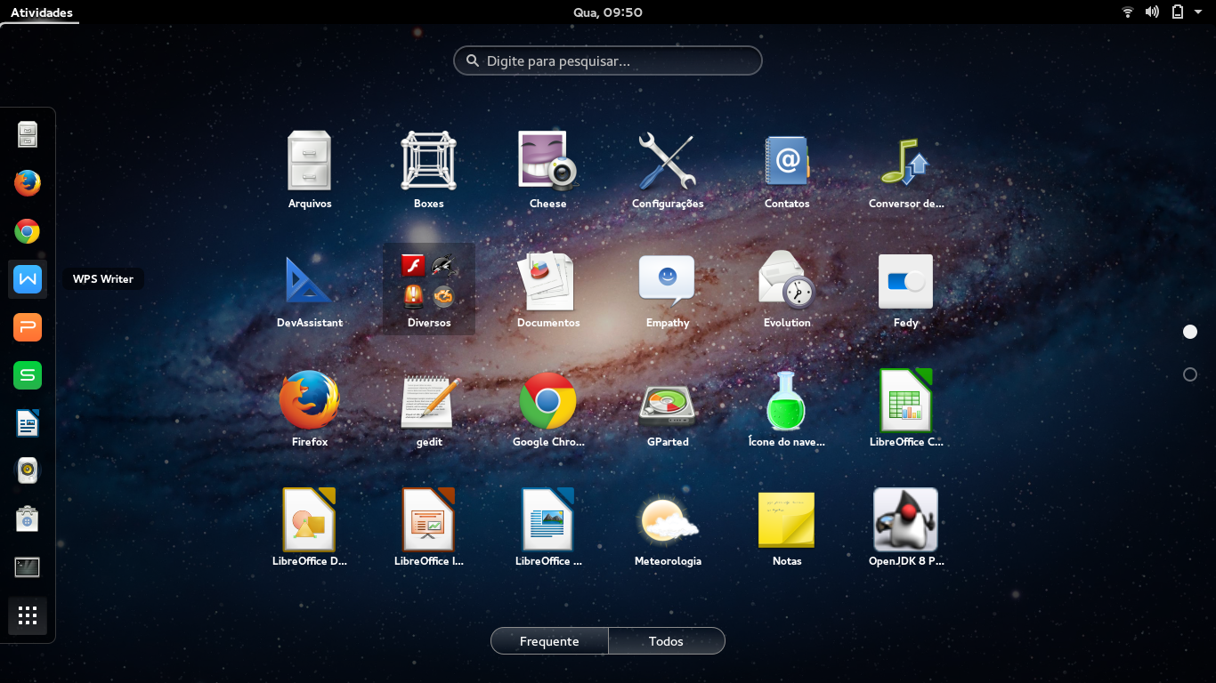 Captura Fedora 21 (Gnome Shell)